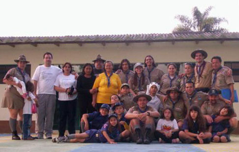 Nosso Grupo voltando do Acampamento